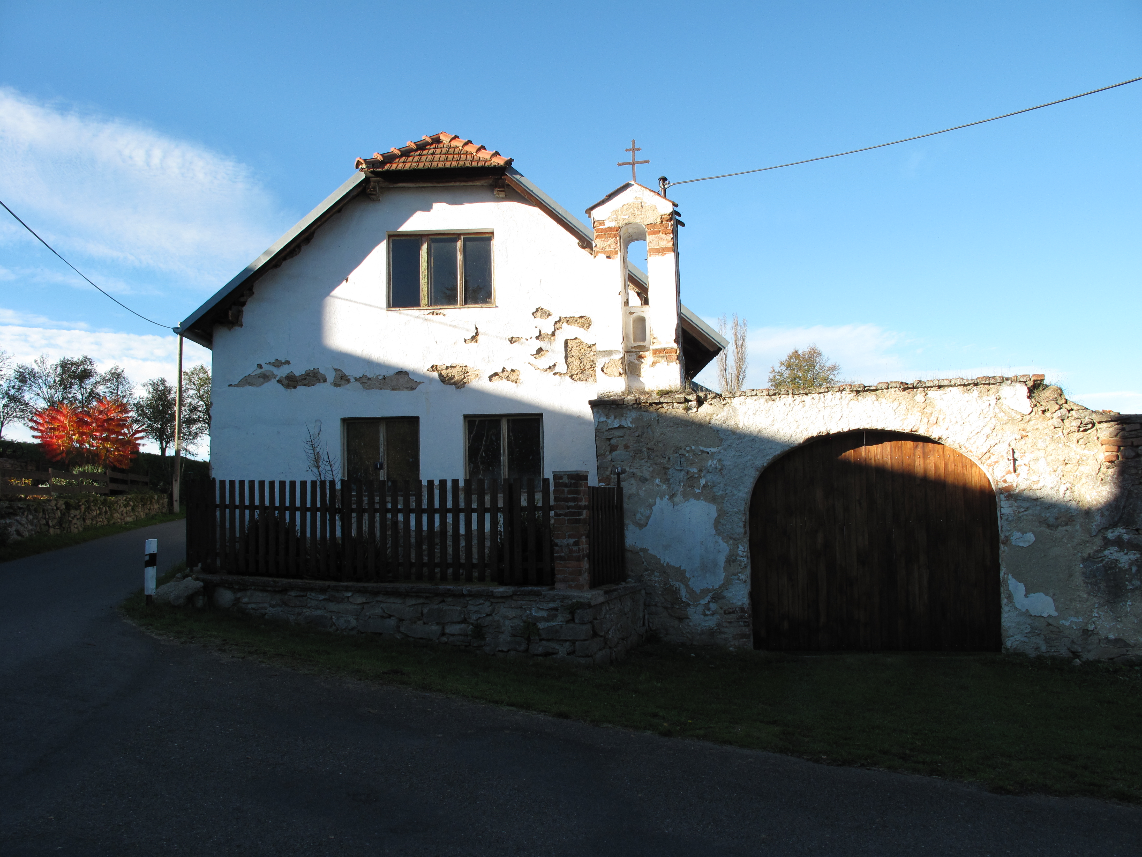 Dům a zvonička v Martinicích. Okres Příbram, Česká republika.